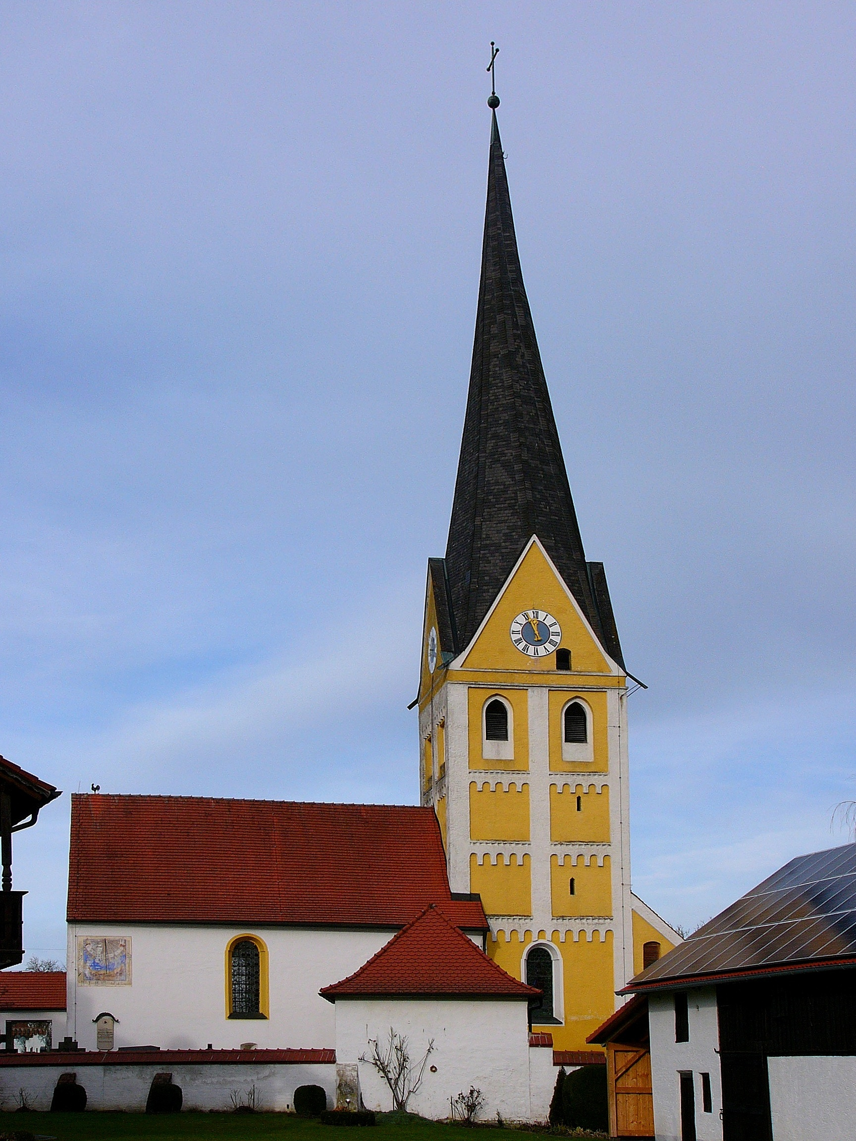 Kath. Kirche St. Petrus; spätromanischer Chorturmbau, 12./13. Jh.; mit Ausstattung; Ehem. Seelenhaus, jetzt Leichenhaus, um 1730.This is a photograph of an architectural monument.